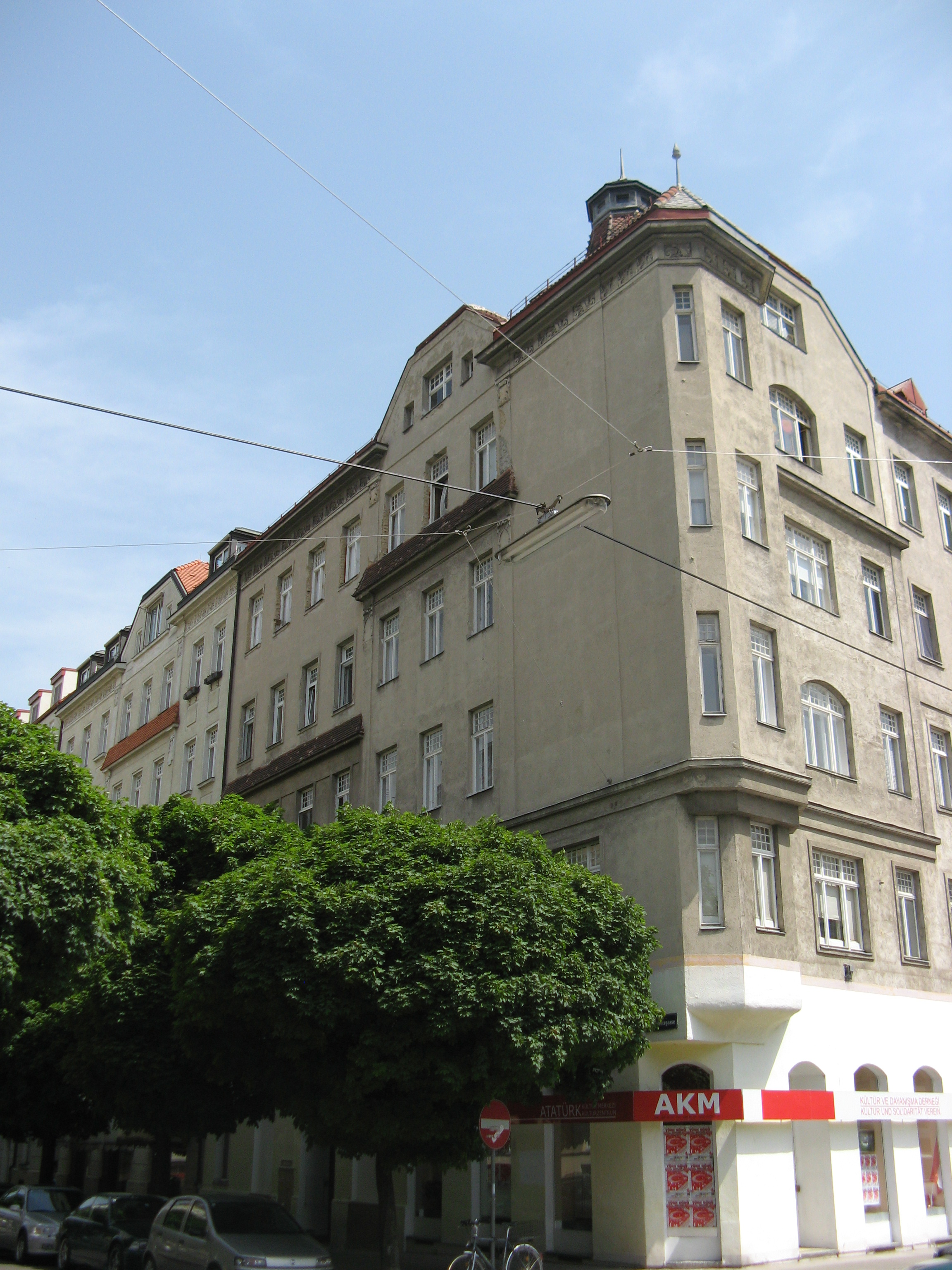 Doppelhaus (1911-12) von Anton Belohlavek, Neusetzgasse 7-9, Wien-Favoriten